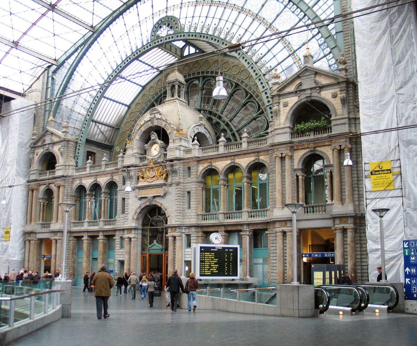 Antwerpener Gare Hal.